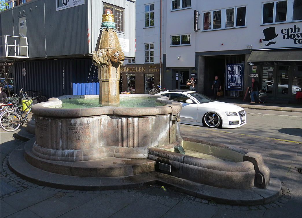 Vandkunst af Johannes Magdal Nielsen (1862-1941), Vandkunsten, København